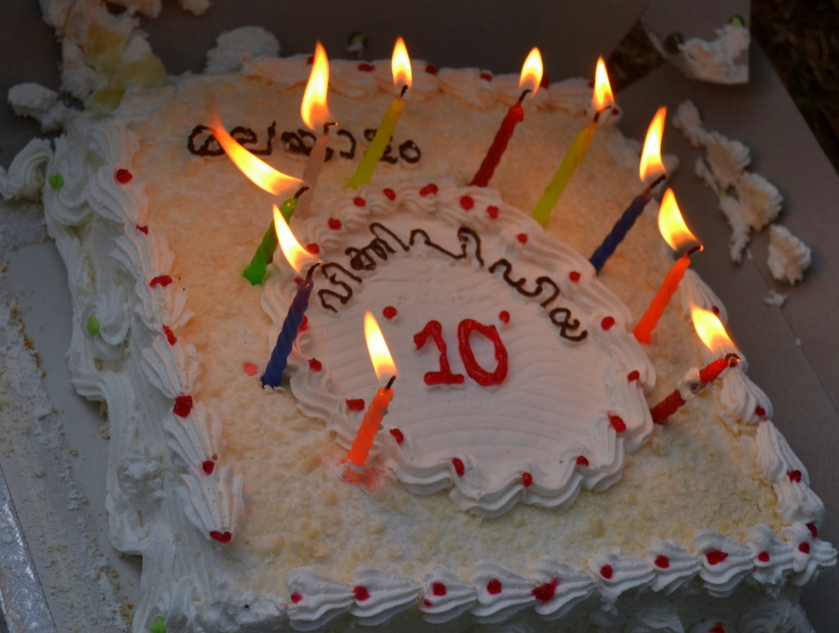 ഹാപ്പി ബെർത്ത്ഡേ മലയാളം വിക്കിപീഡിയ.. പത്തു വയസ്സിലെത്തുന്ന മലയാളം വിക്കിപീഡിയയ്ക്കു വേണ്ടി വിക്കി ഫേസ് പ്ലസ്സ് കൂട്ടായ്മ, തൃശ്ശൂർ തേക്കിൻകാട് മൈതാനം